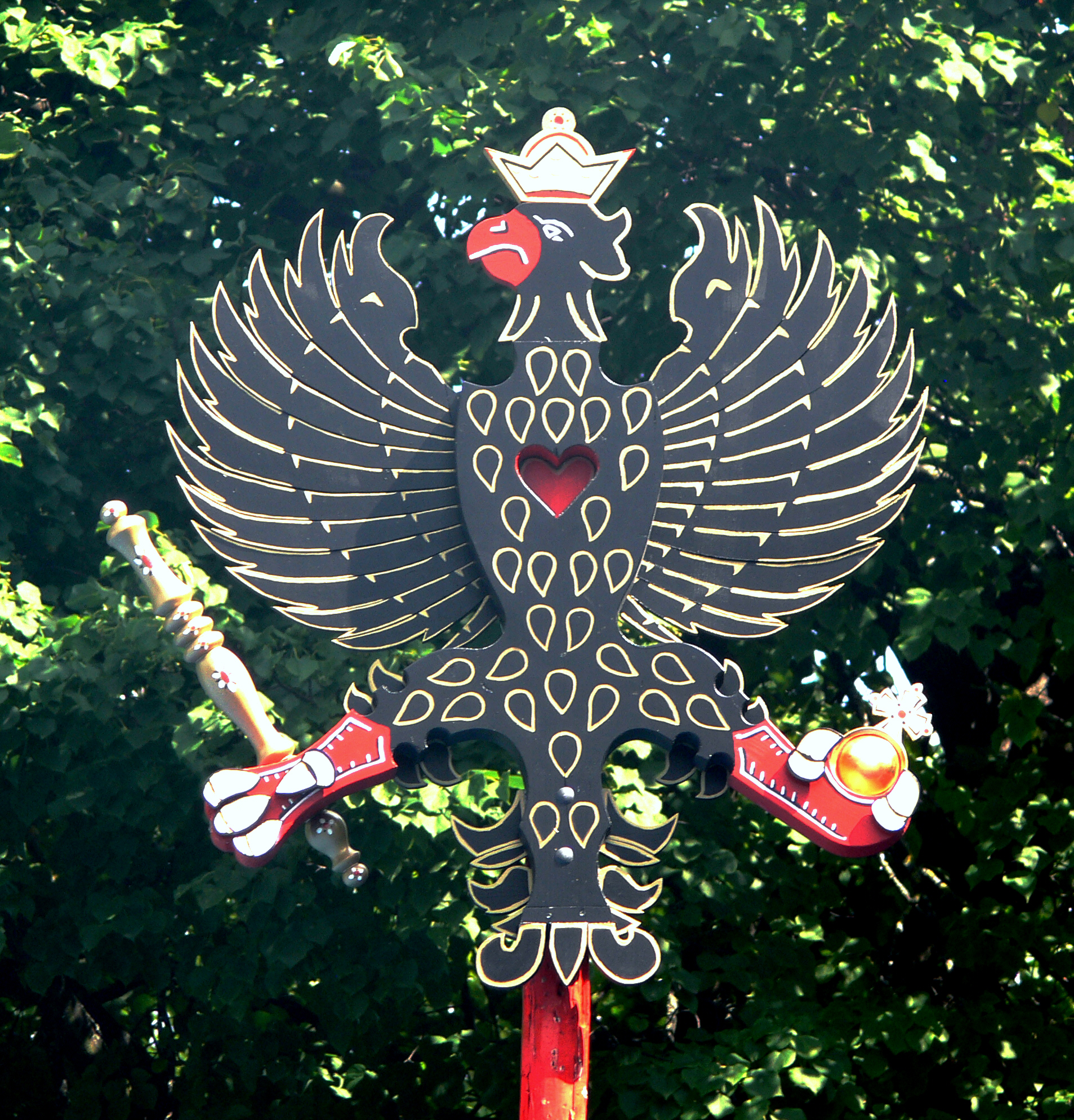 Rutenfest Ravensburg, Altenschießen 2010 (Adlerschießen der ehemaligen Gymnasiasten), Insignienadler (Schützenkönig des Altenschießens wird der Schütze des Reichsapfels unten rechts, weitere Insignien sind das Zepter links, Kopf und Krone sowie das Herz. Auch alle Federn können geschossen werden. Als Trefferschützen gelten auch Schützen von Steckschüssen und Abprallern.)